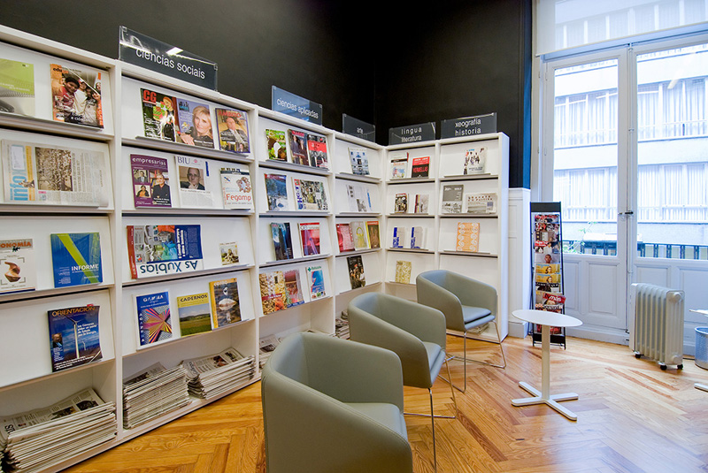 Detalle de la zona de publicaciones seriadas de la biblioteca municipal de estudios locales de A Coruña